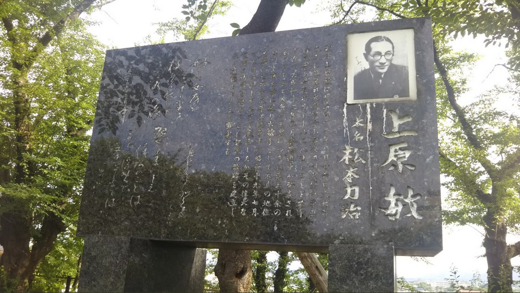 上原敏の顕彰碑。上原の紹介とともに、「妻恋道中」の詩が刻まれている。